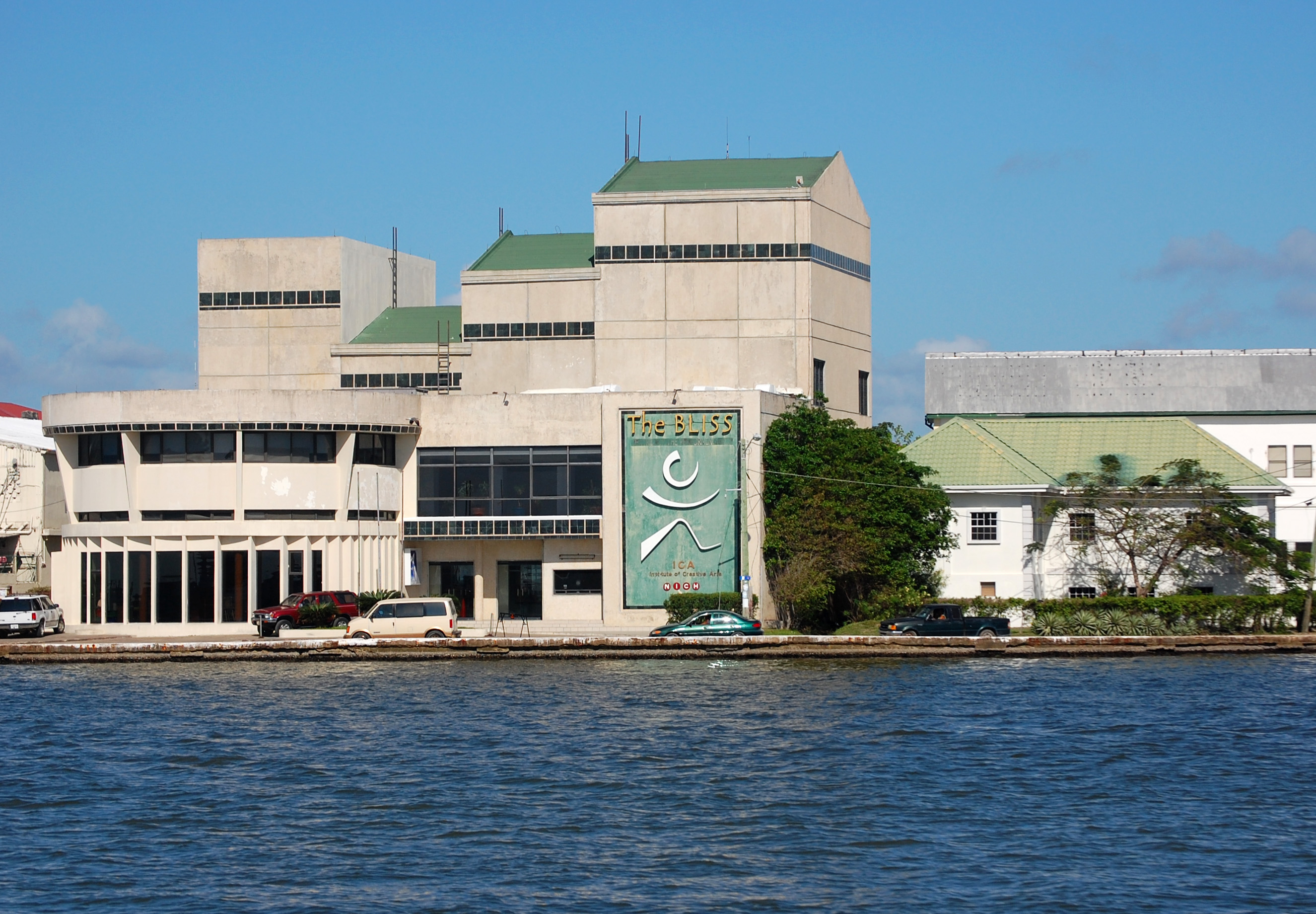 Belize City, Belize, Central America